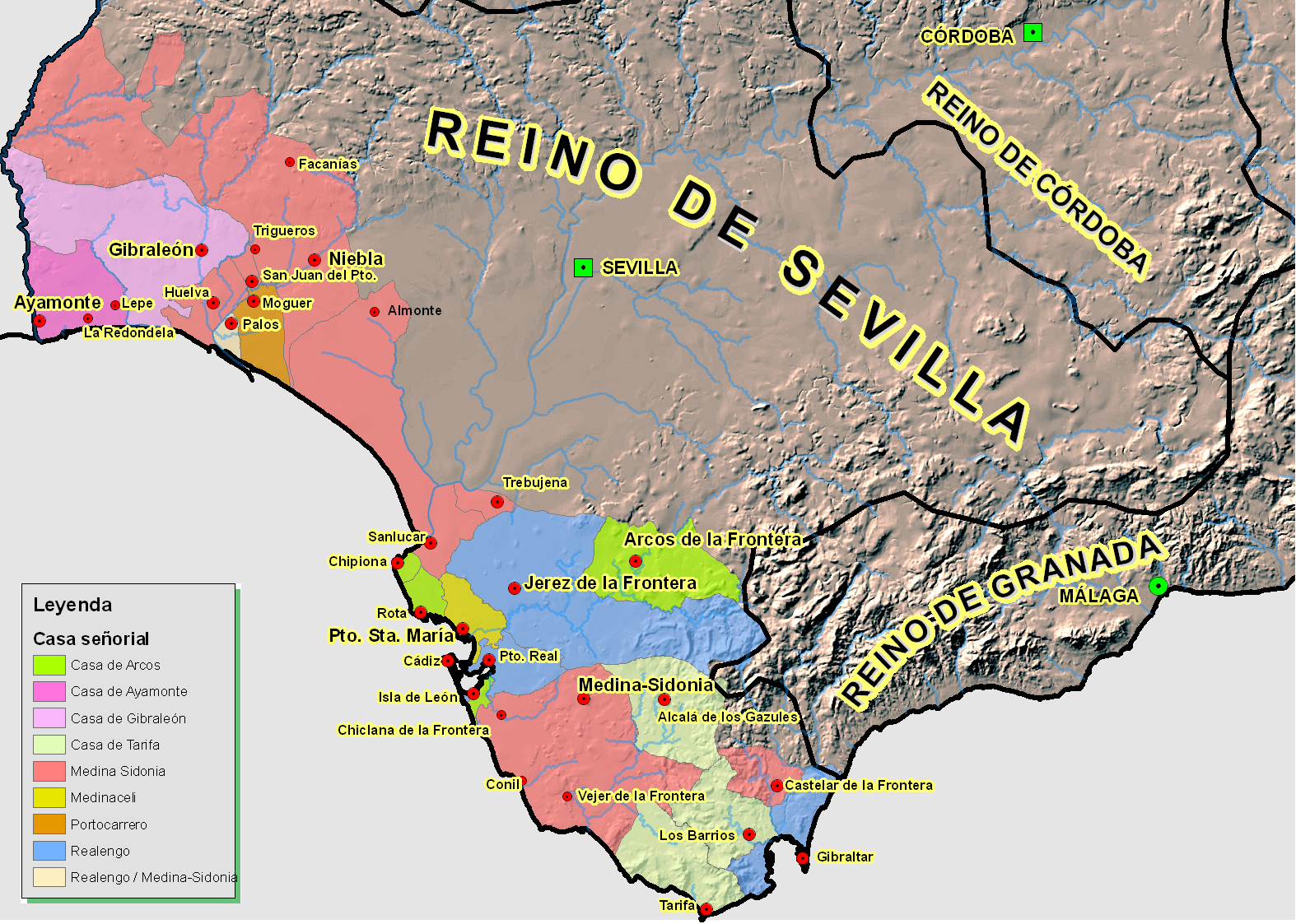 Señoríos en la Andalucía Occidental hacia el reinado de Carlos I